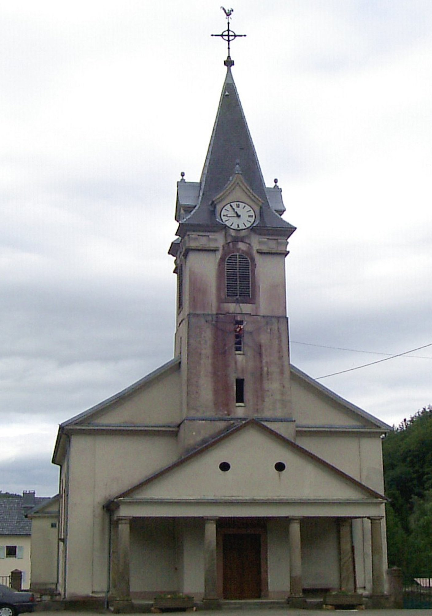 L'église Saint-Pierre et Saint-Paul à Wildenstein